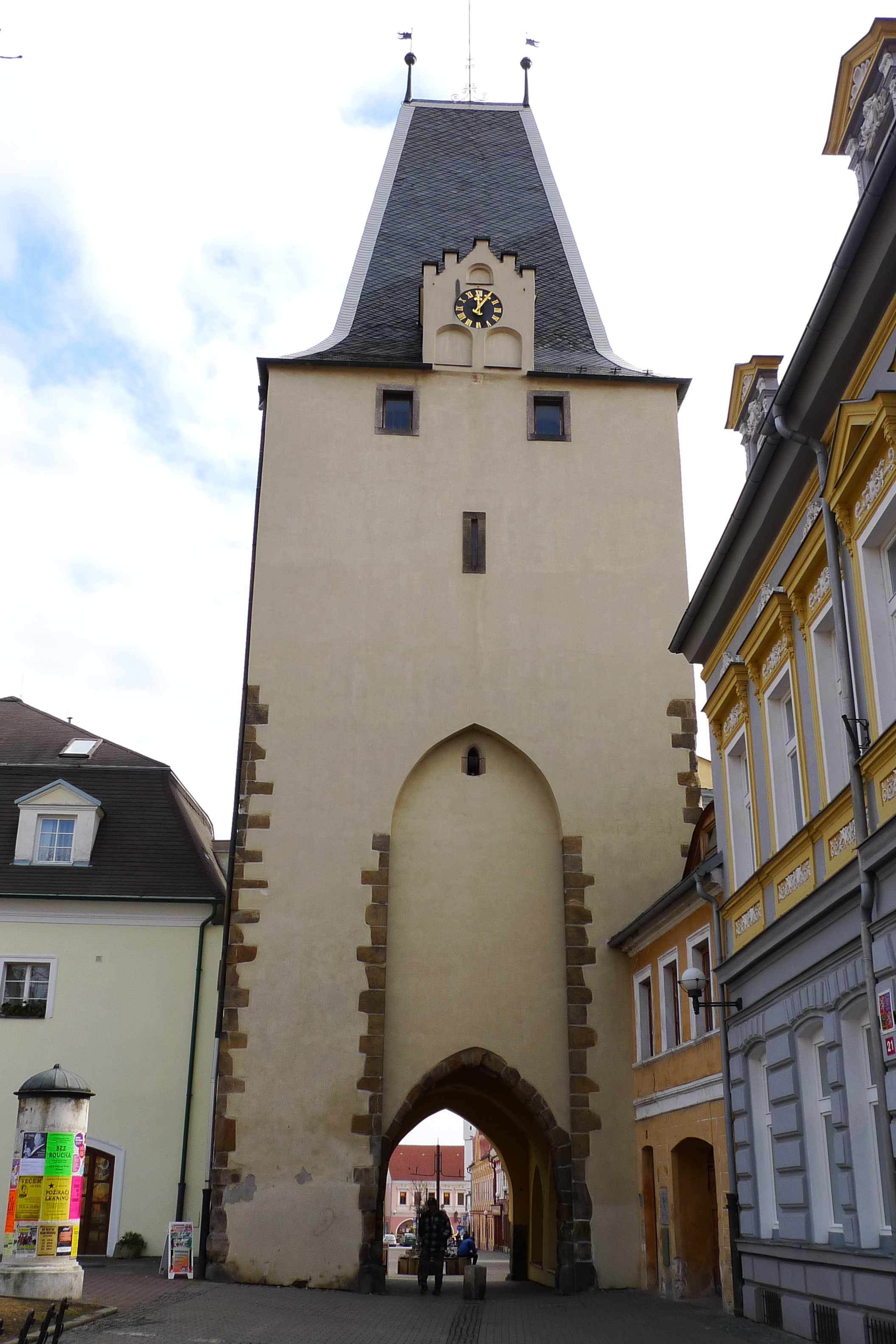 Kadaň, Jana Švermy, Mikulovická brána.